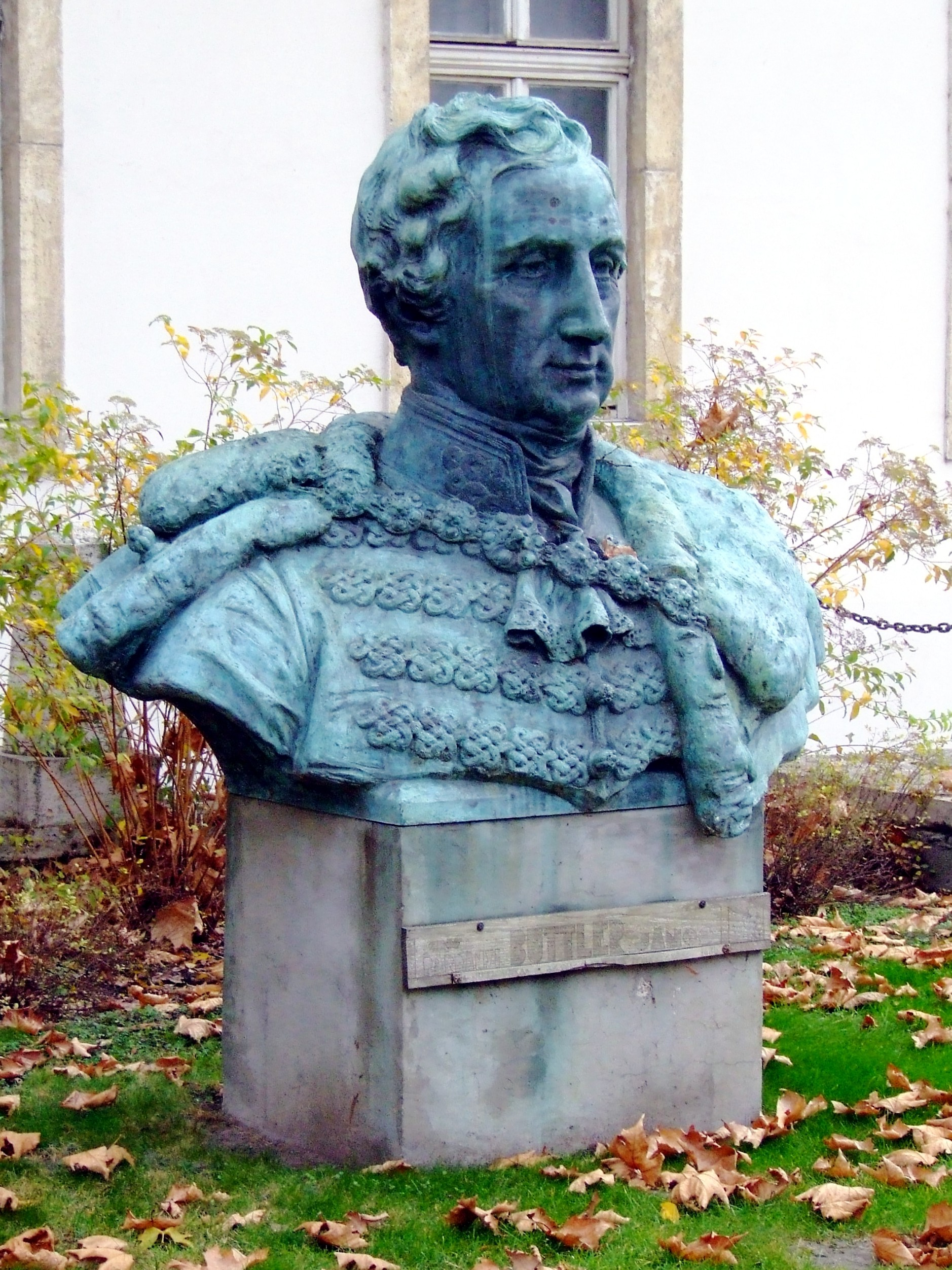 Buttler János szobra a budapesti Hadtörténeti Múzeum kertjében